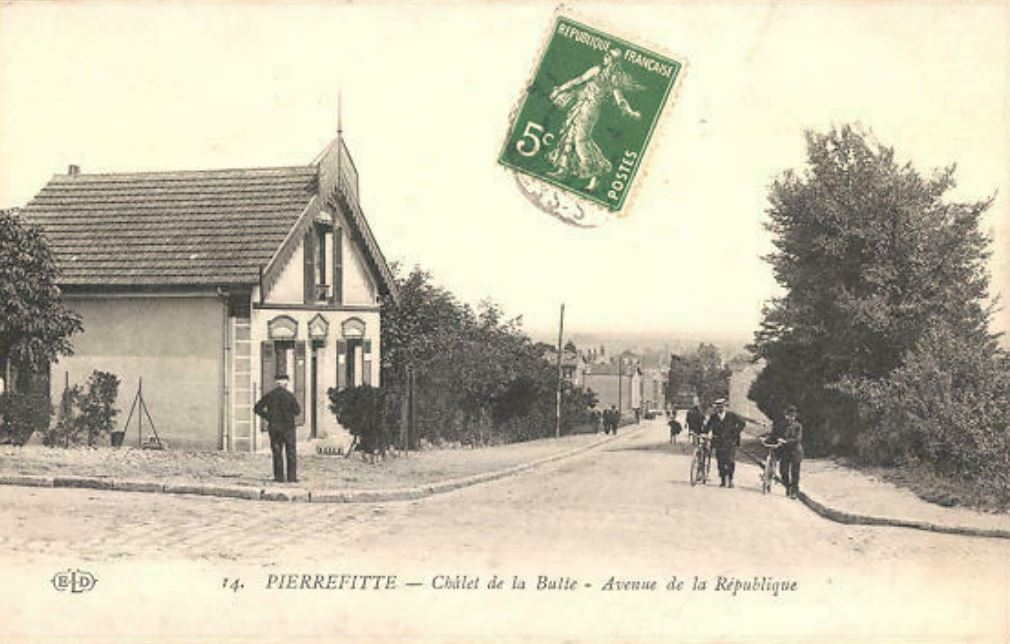 Pierrefitte.Avenue de la République.Châlet de la Butte